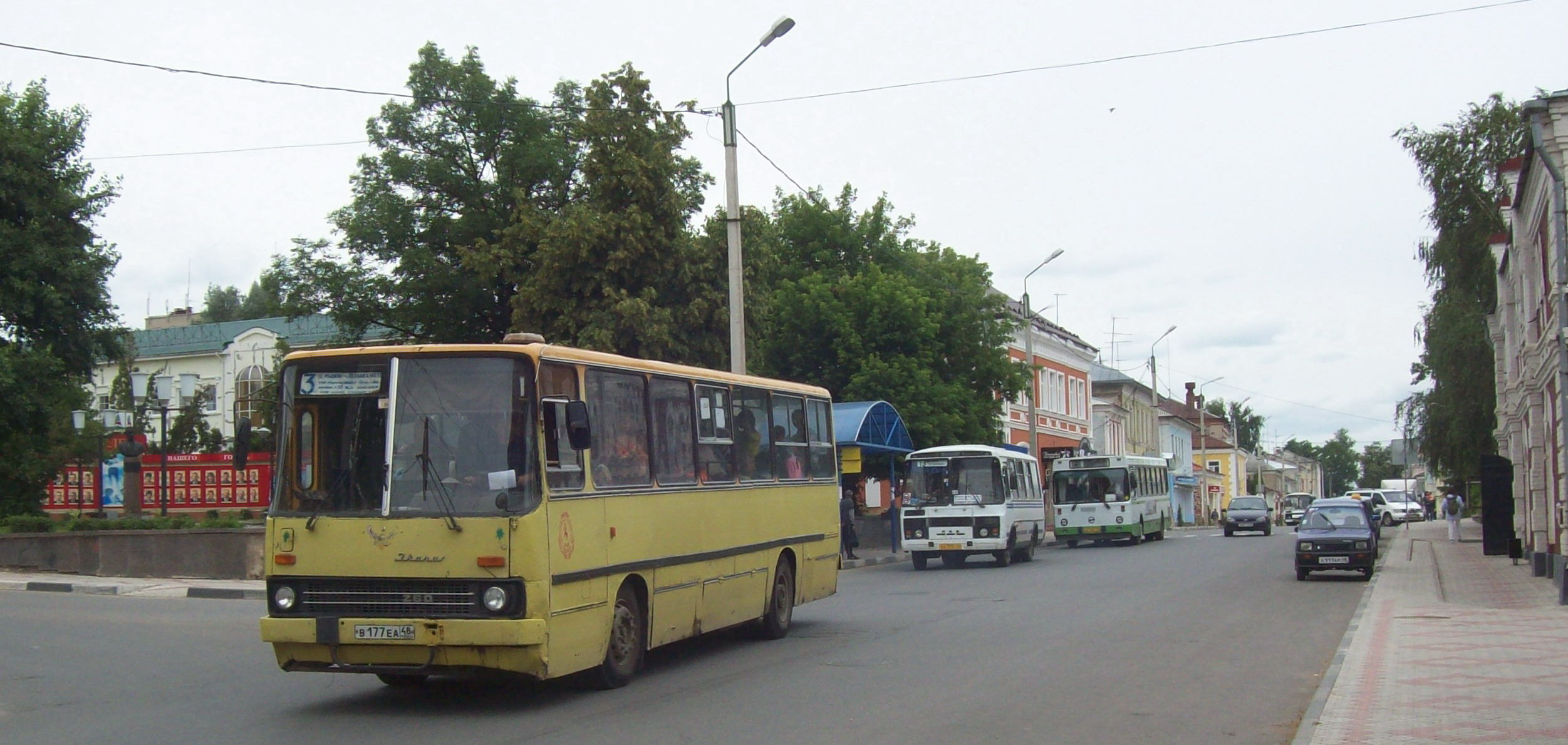 Елец. Городской автобус Икарус-260 в центре города